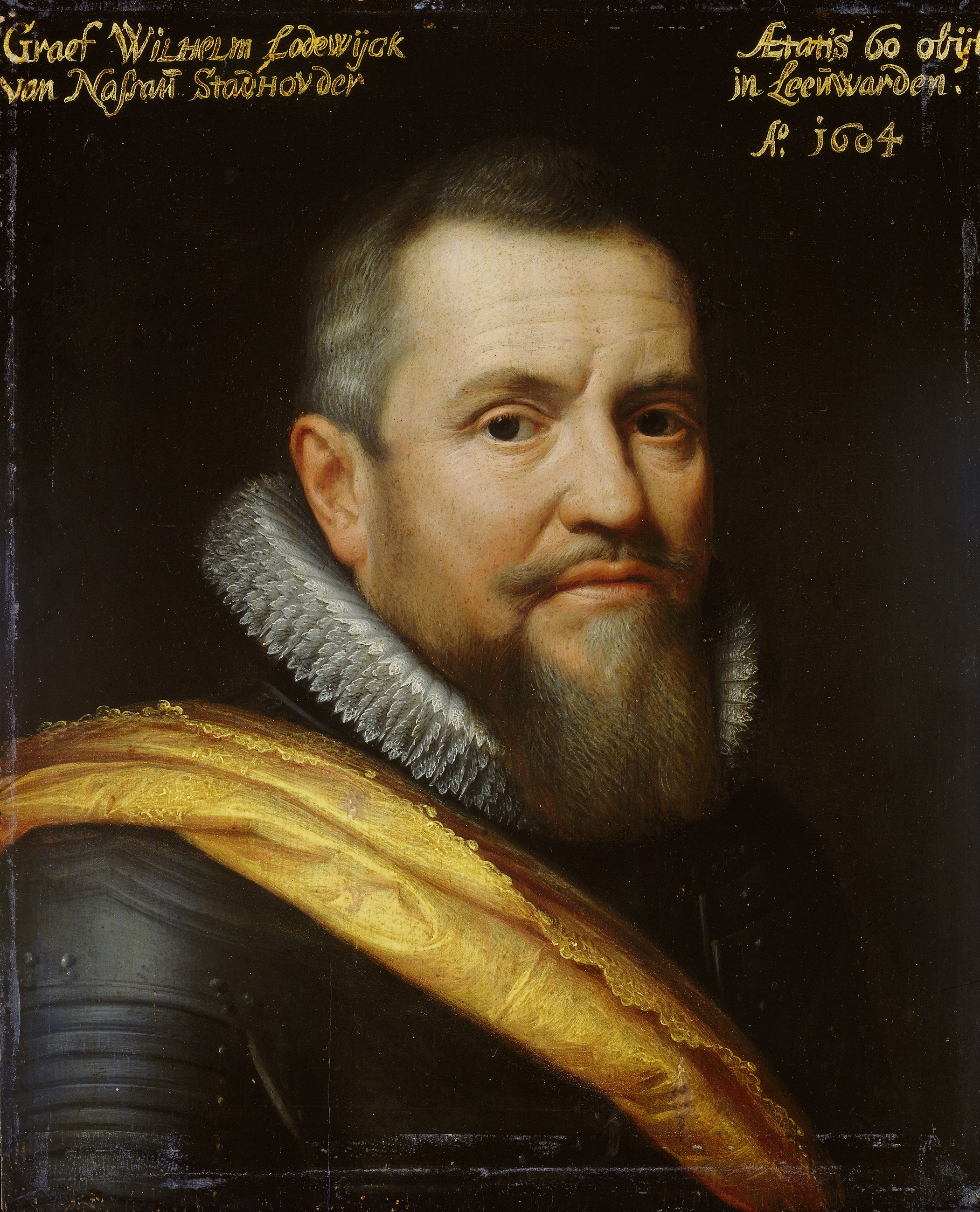 Portret van Willem Lodewijk (1560-1620), graaf van Nassau, genaamd 'us heit'. Buste naar rechts, in wapenrusting. Onderdeel van de reeks portretten afkomstig uit het Stadhouderlijk Hof te Leeuwarden. Collection: schilderijen; Leeuwarden serie